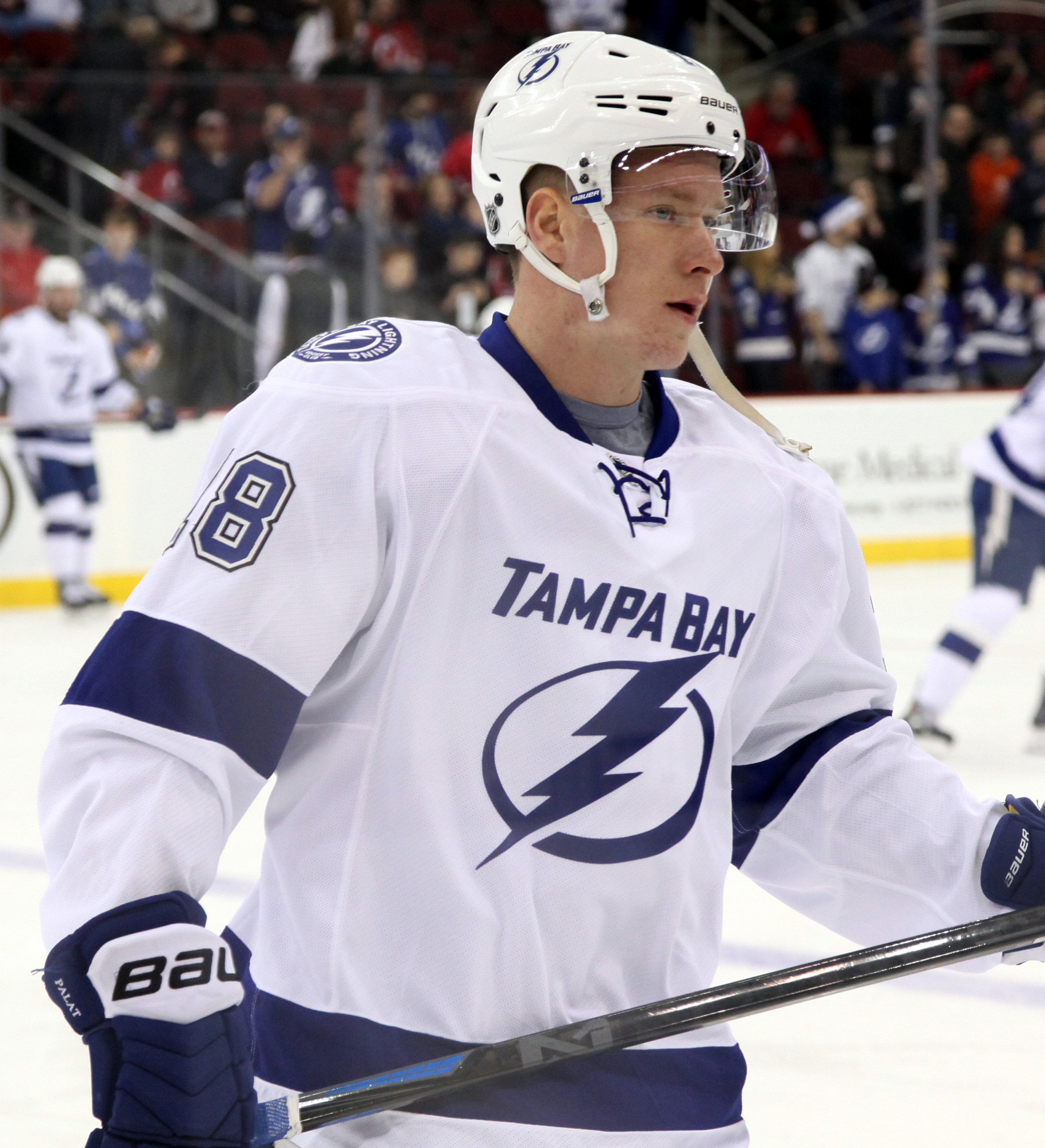 Ondrej Palat in December 2014.